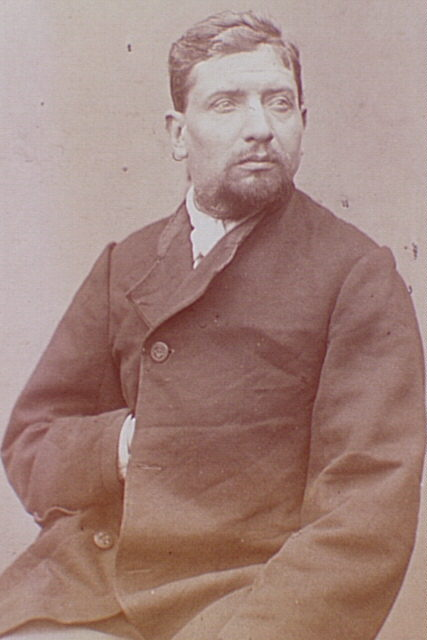 Edouard Moreau (1836-1871)